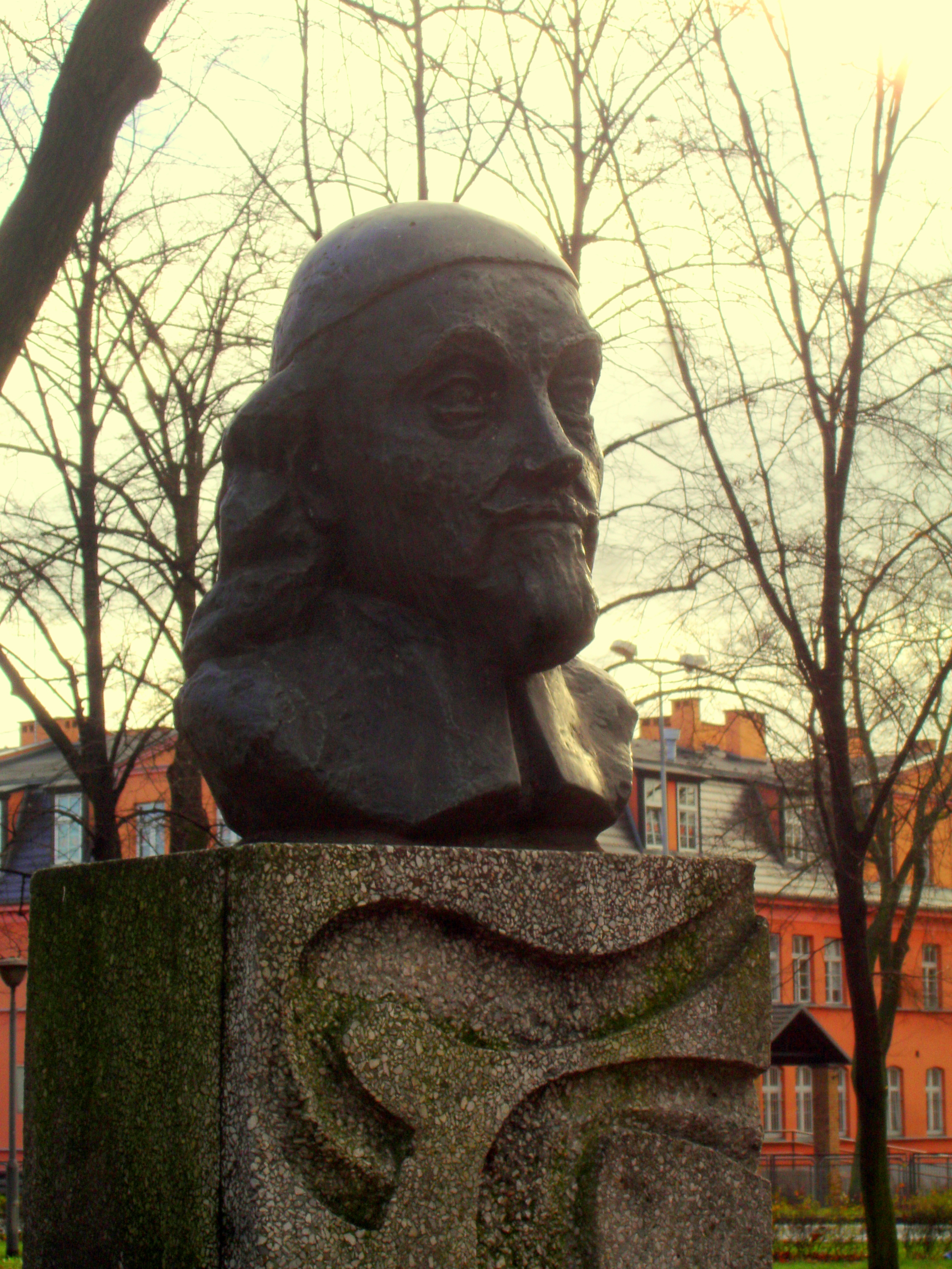 Głowa odlana z brązu na pomniku Jana Jonstona w Lesznie